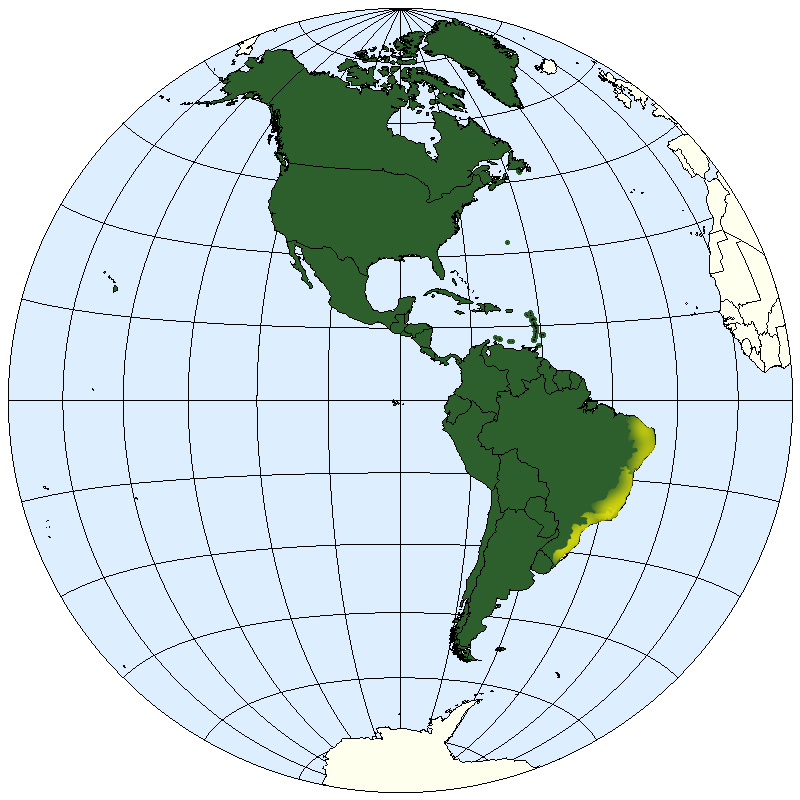 (rã arborícola) nativa do bioma Mata Atlântica no Brasil, especialmente em Minas Gerais